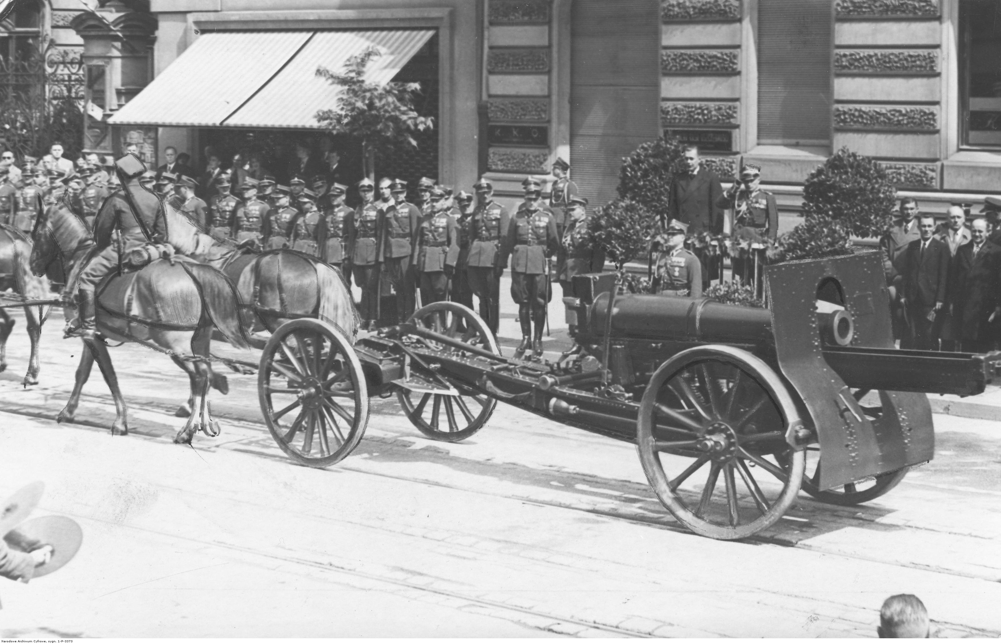 Uroczystości Święta Żołnierza w Łodzi z okazji rocznicy Bitwy Warszawskiej 1920 roku zwanej "cudem nad Wisłą". Fragment defilady artylerii, widoczna haubica 155 mm wz. 1917.